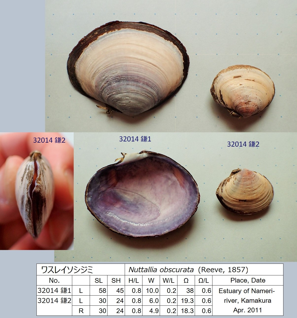 材木座海岸の滑川河口産。やや厚めで、詳しい分類ではワスレイソシジミと思われる。